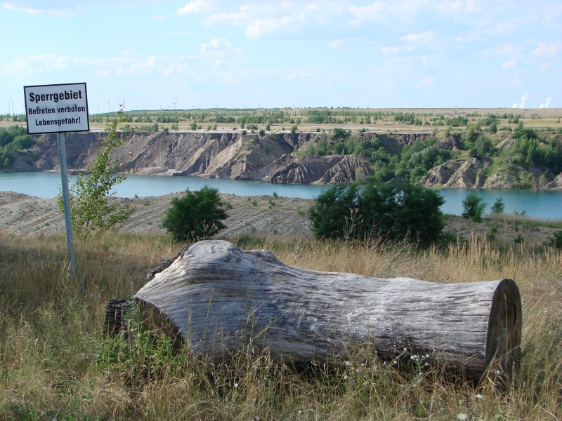 Blick auf den künftigen Klinger See. Südteil des Tagebaus Jänschwalde, der Bereich, in dem sich das ehemalige Dorf Klinge befand. Gemeinde: Wiesengrund, Kreis: Spree-Neiße, Land: Brandenburg, Deutschland.